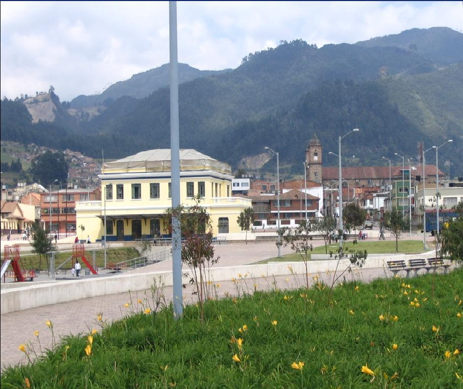 Estación de la Sabana en Zipaquirá, detrás se observa el centro histórico de la ciudad y al fondo los cerros de Zipaquíra, en cuyas entranas se localizan las minas y Catedral de Sal. Foto tomada por tequendamia para la wikipedia Categoría:Colombia (imagen)